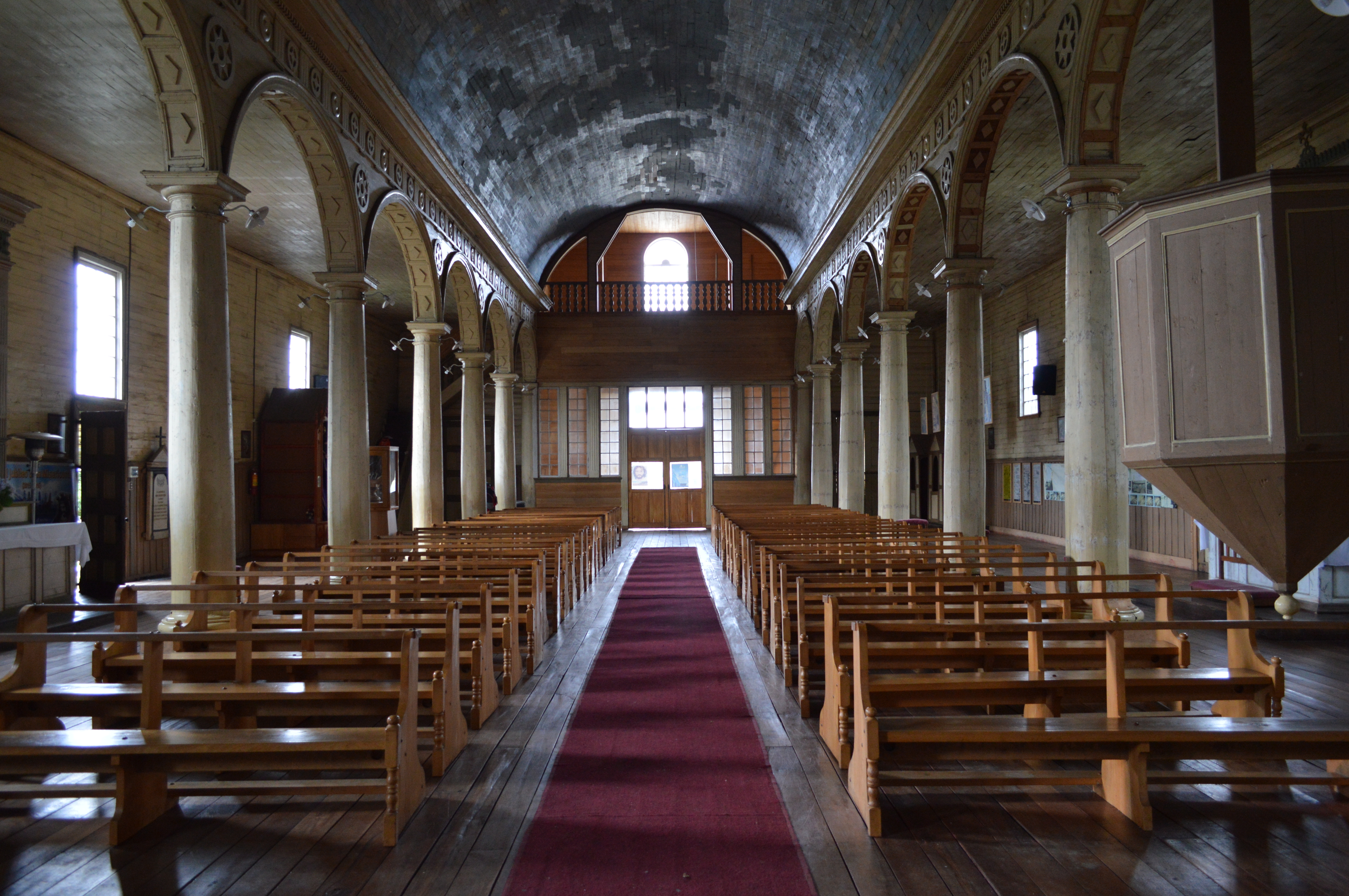 Vista hacia la salida, altillo y púlpito de la Iglesia de Chonchi